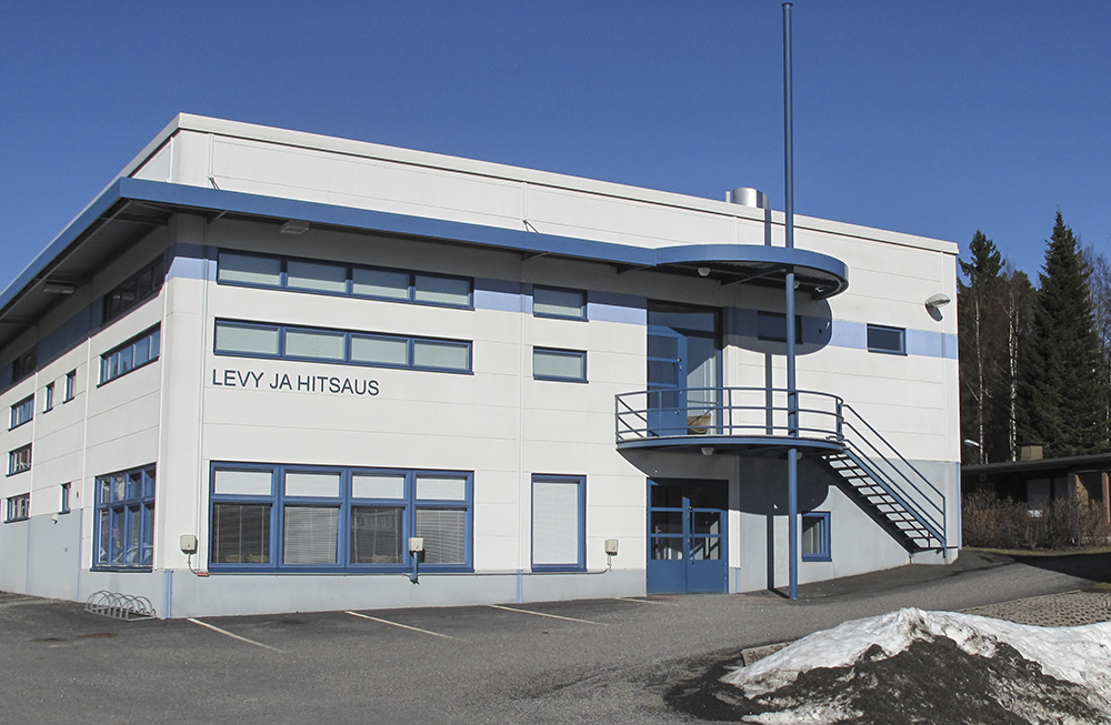 Uusi Levy- ja hitsausosasto